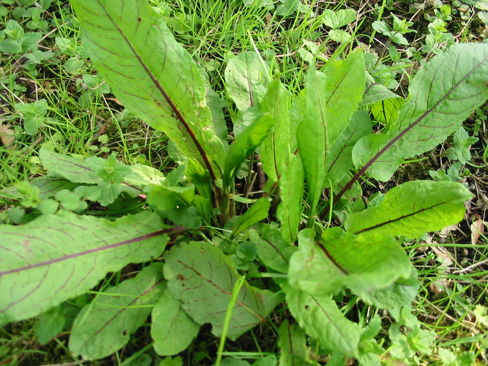 Rumex sanguineus var. sanguineus, Netherlands